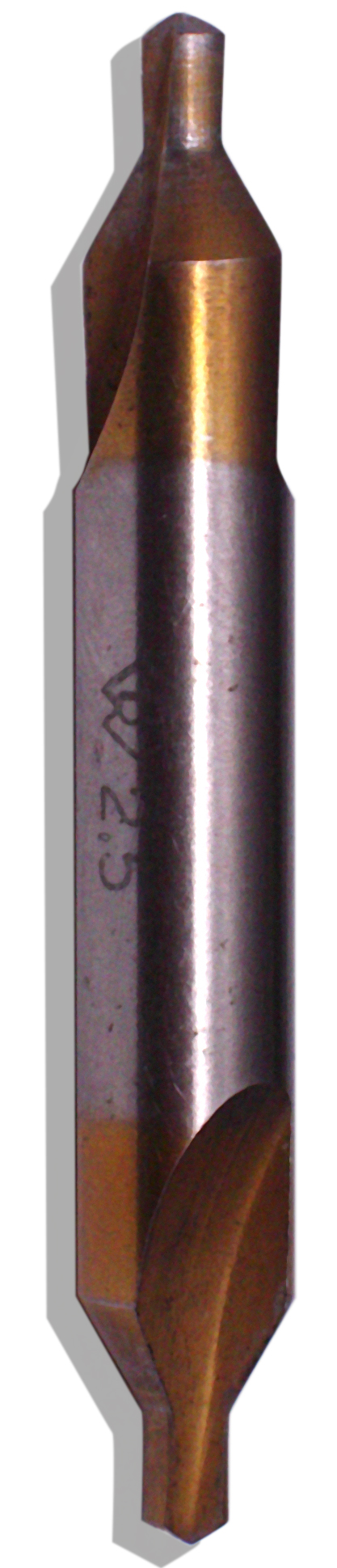 Nawiertak, Autor: SsawkaGrafika udostępniona na licencji GFDL